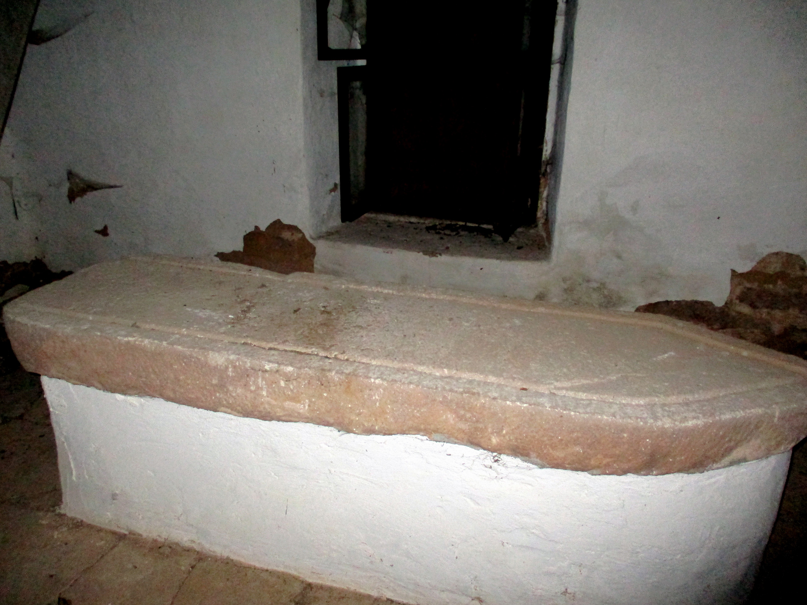 Waschstein im Totenhaus Jüdischer Friedhof Altengronau